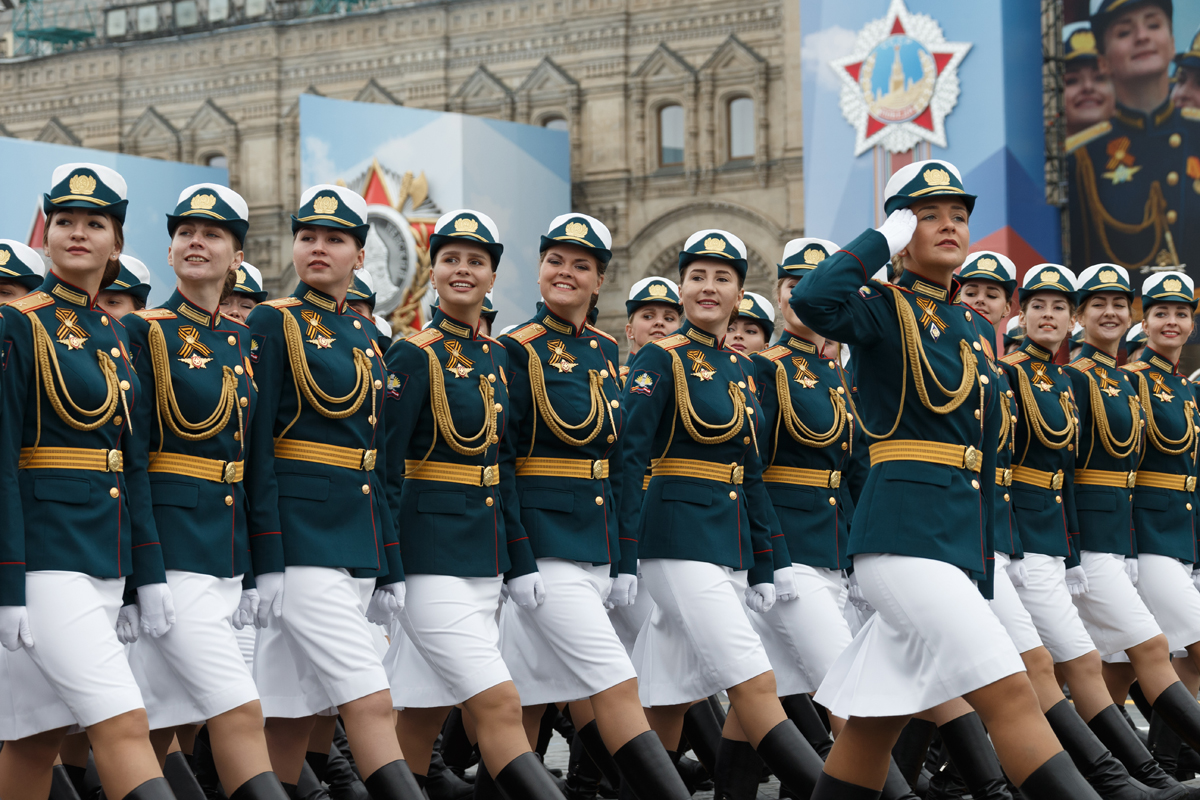 В Москве прошел парад в честь 74-й годовщины Победы в Великой Отечественной войне